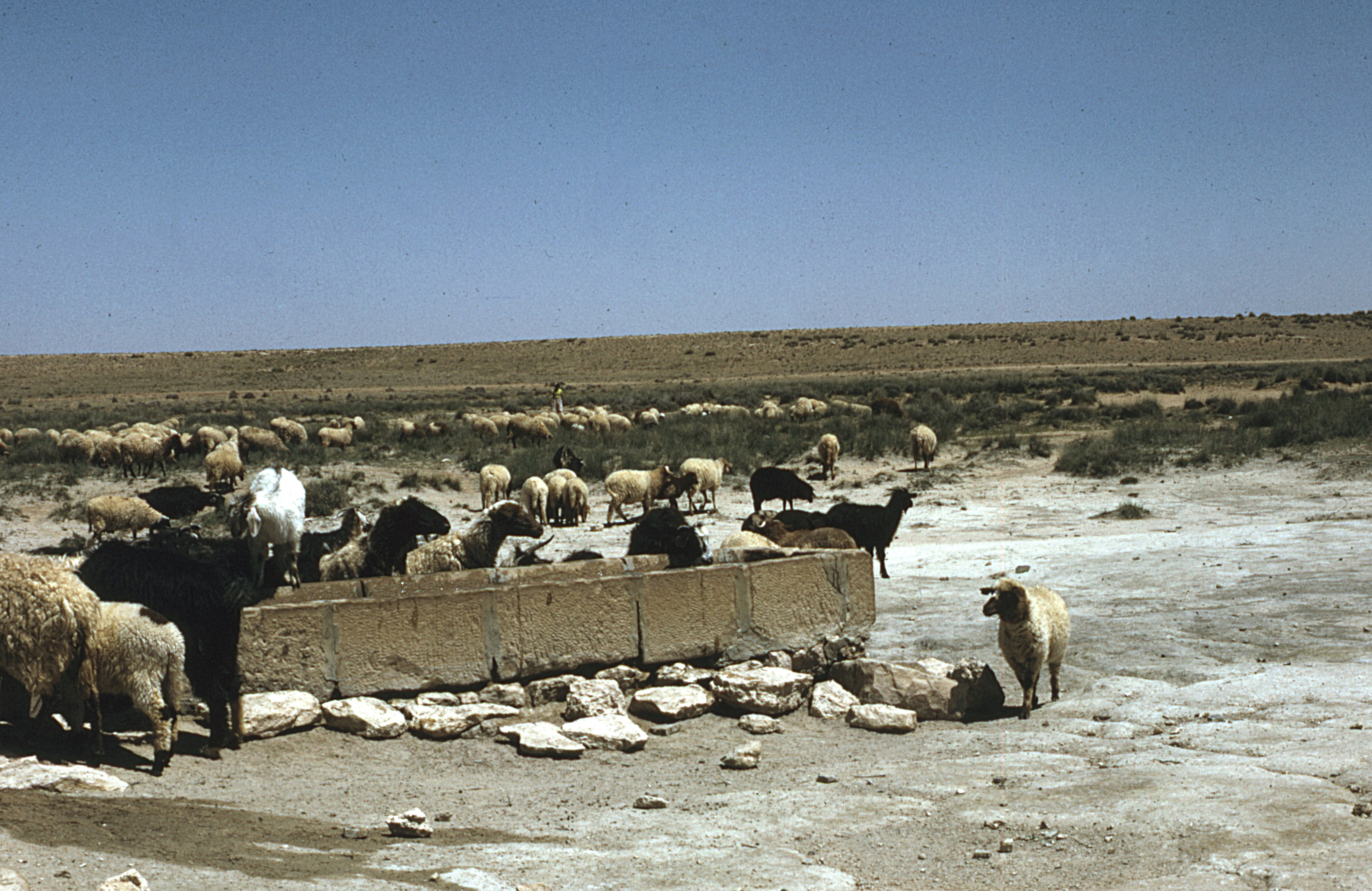 Troupeau ovin et caprin à l'abreuvement en zone steppique